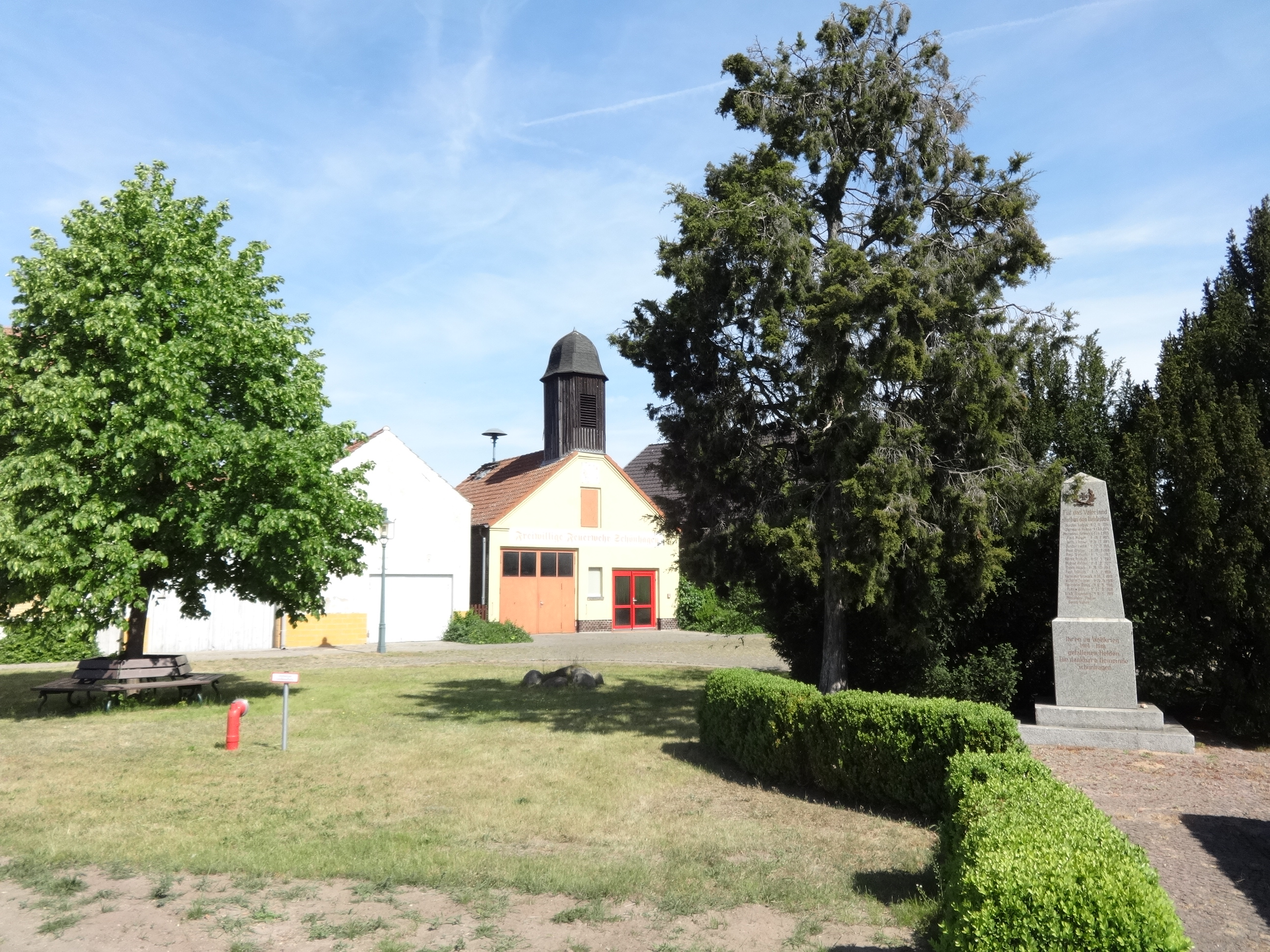 Denkmal für die Gefallenen des Ersten Weltkrieges und Gebäude der Freiwilligen Feuerwehr in Schönhagen, ein Ortsteil von Trebbin, Brandenburg